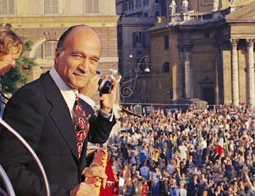 Giorgio Almirante, anni '70